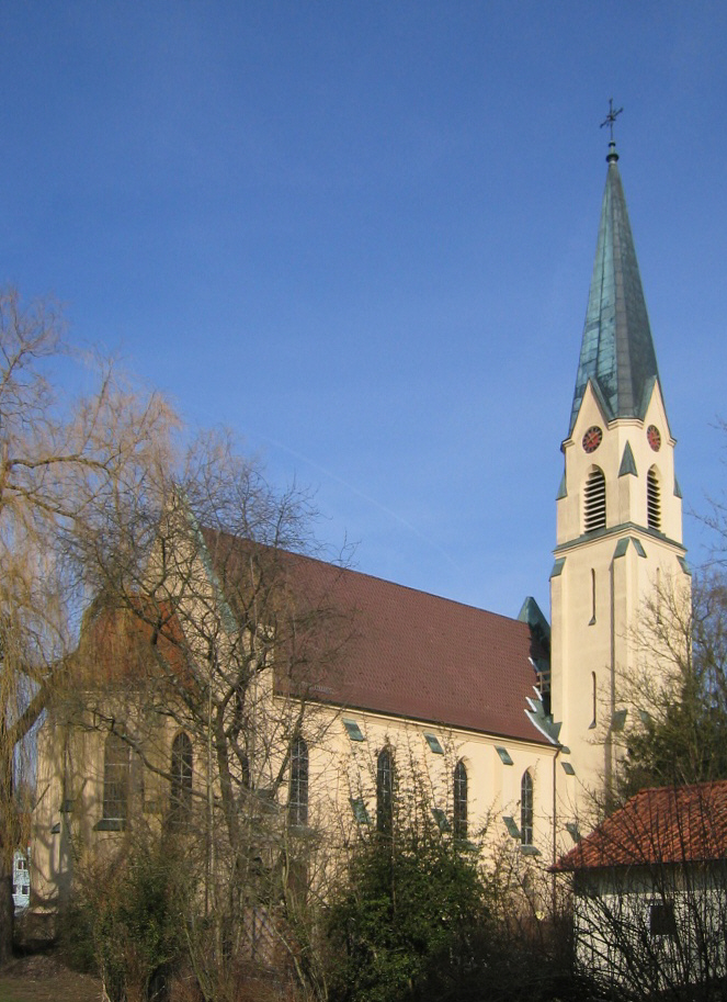 Evangelische Kirche in Altshausen, Landkreis Ravensburg